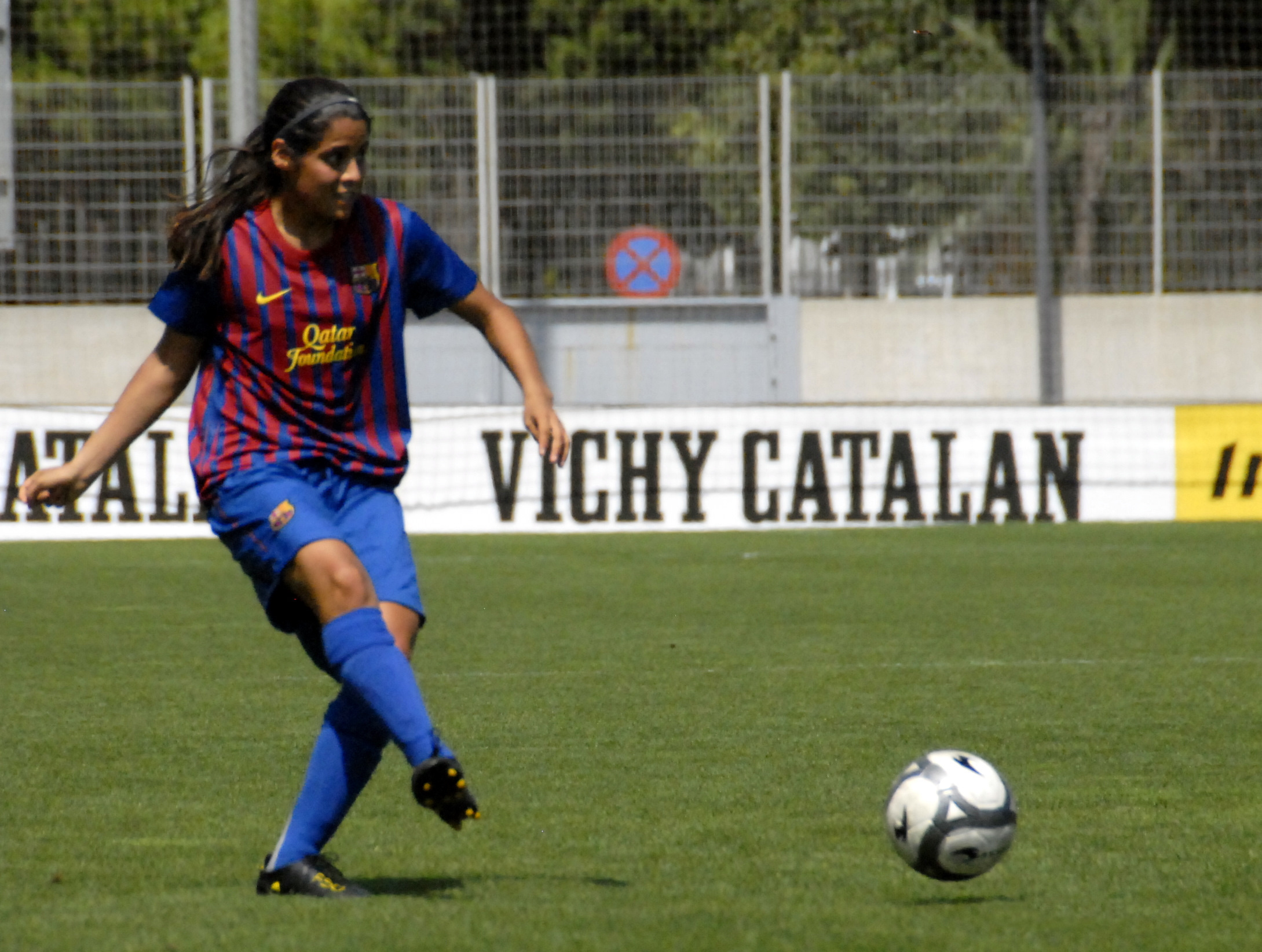 Escenes de la final.